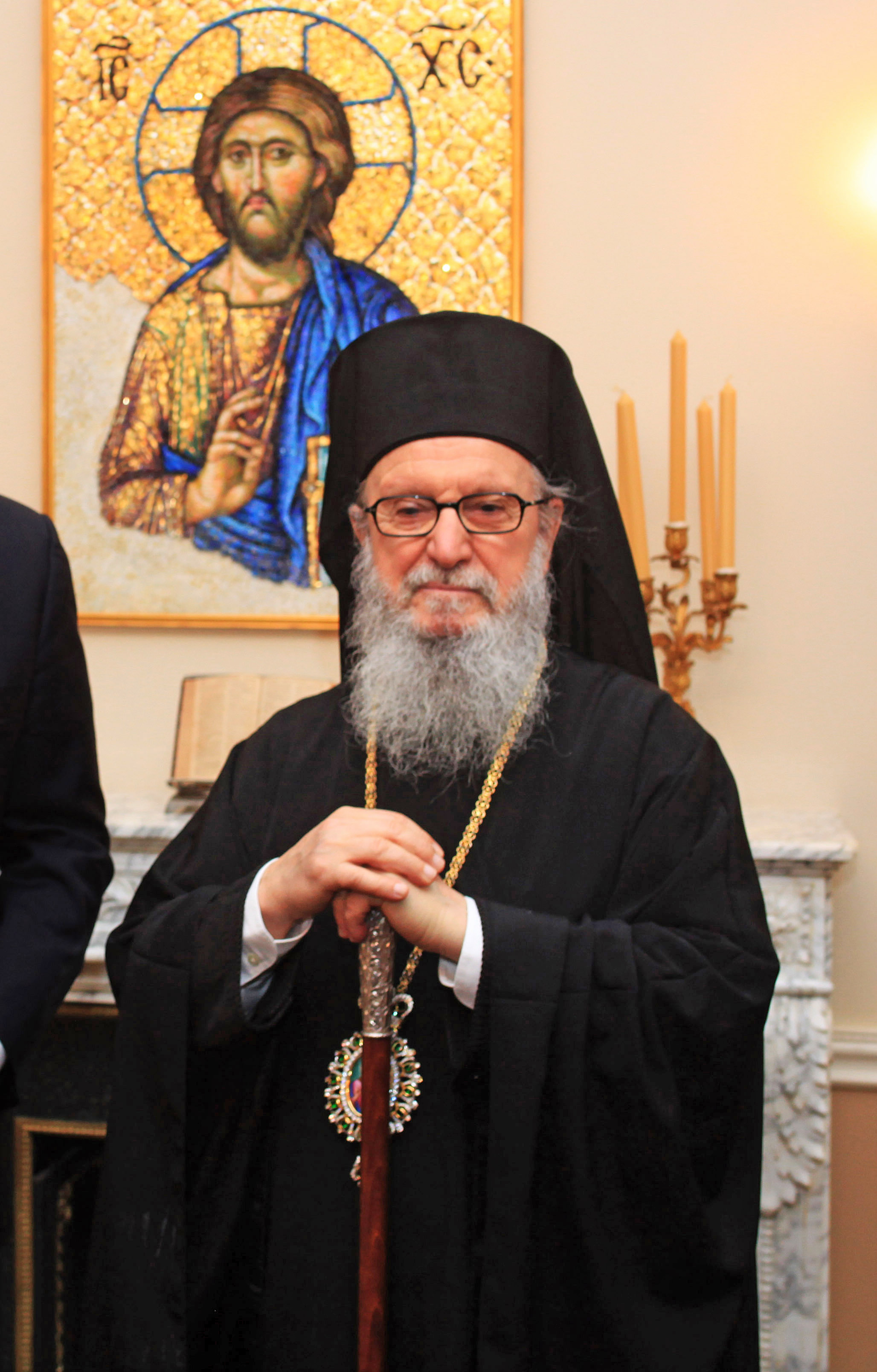 Συνάντηση ΥΠΕΞ κ. Δ. Δρούτσα με Αρχιεπίσκοπο Αμερικής, Δημήτριο.